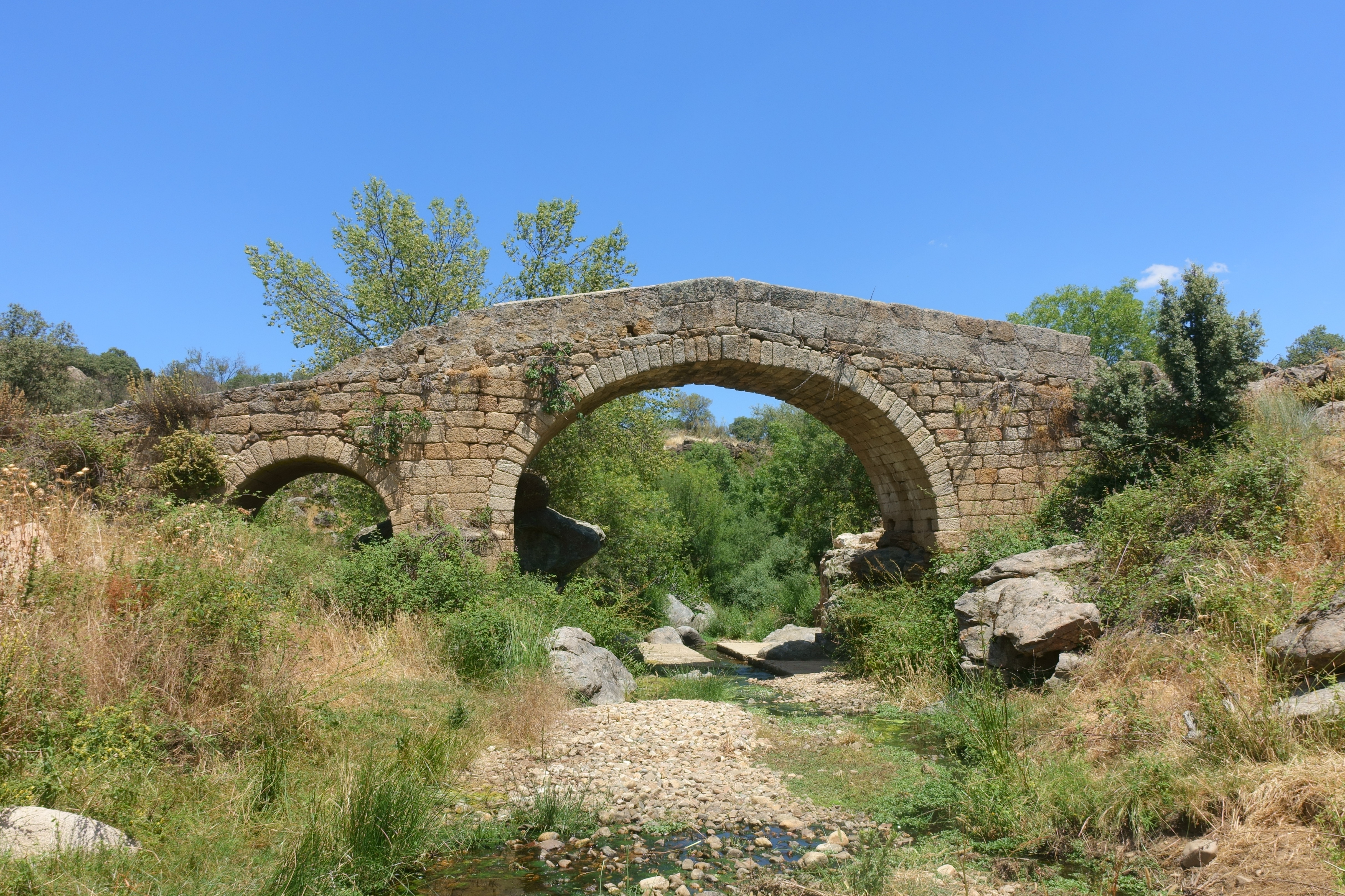 Puente romano en Villarejo de Montalbán (Toledo, España).